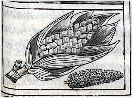 Uno de los primeros imagines europeos de maiz